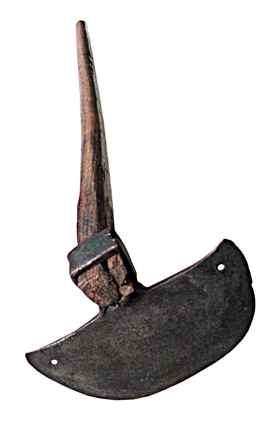 Мотика, Етнографски музеј, Београд, Србија (аутор: Михаило Грбић).